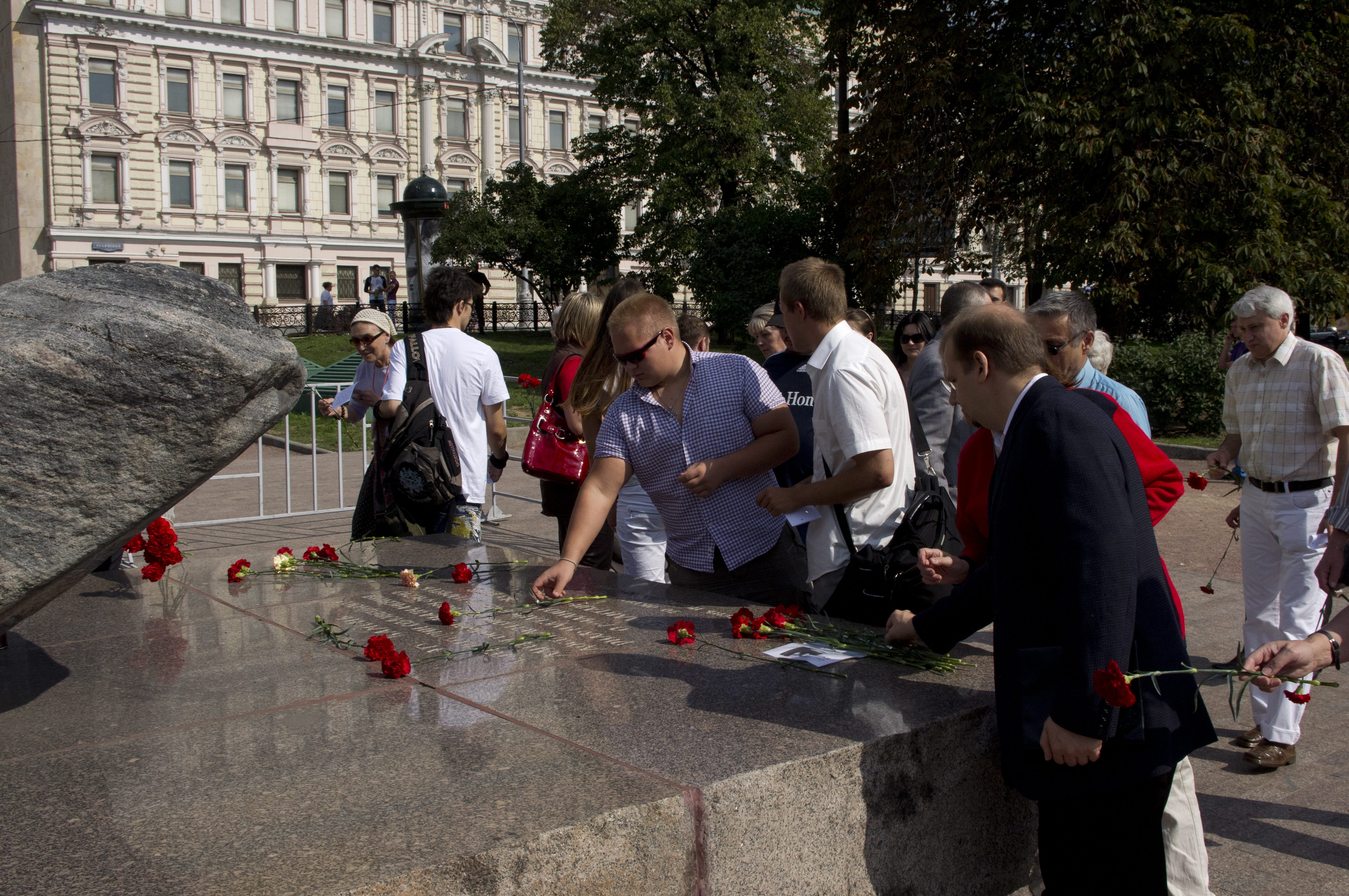 Ежегодная церемония возложения цветов у Соловецкого камня в Москве, 28 августа 2011 года, 70-я годовщина сталинскиой депортации поволжских немцев.